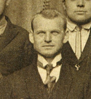 Jaroslav Soukup (1902-1989), český salesiánský kněz